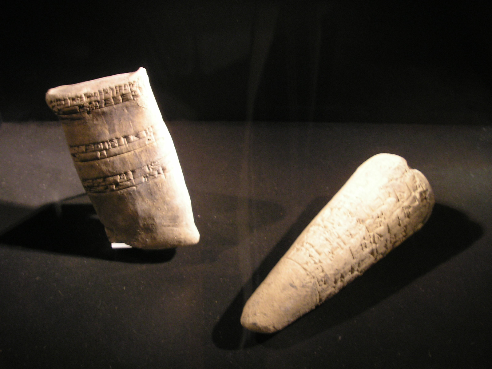 Sumerischer Keilschrifts-"Grundstein" (rechts). Nordbabylon 19. Jh. v. Chr. Dieser in die Mauer eingelassene Tonkegel enthält die Gründungsurkunde der Stadtmauern von Isin (Tell Bahriyat) durch den König Ischme-Dagan von Isin (1953-1935 v. Chr.). Keilschrift-Tontafel (links). Altbabylonisch, 1900-1700 v. Chr. Legat Margarete Tschudin-Brugger. Diese Tontafel enthält Angaben zu Landvermessungen. Vorderseite in Tabellenform, auf der Rückseite beschreibender Kommentar.